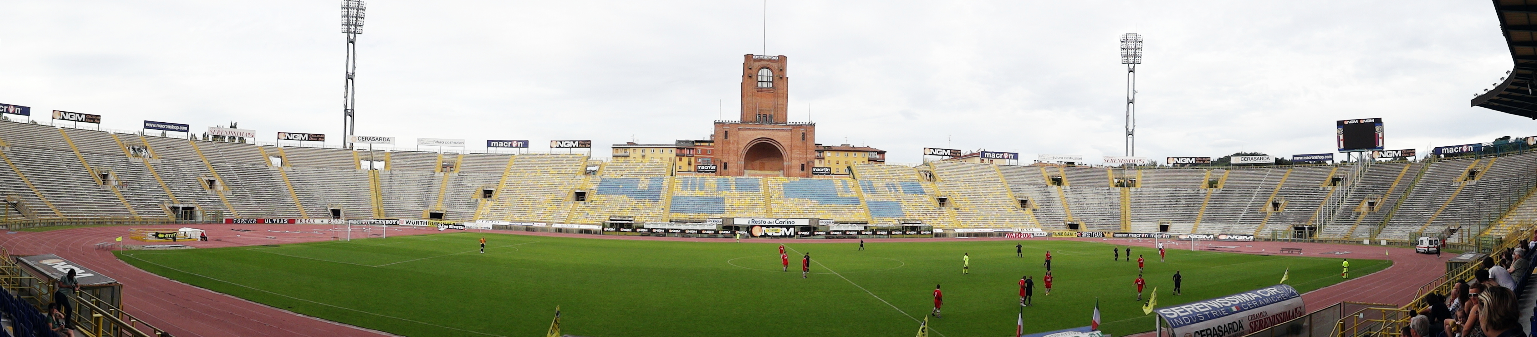 Pano - Stadio Dall'Ara - Bologna